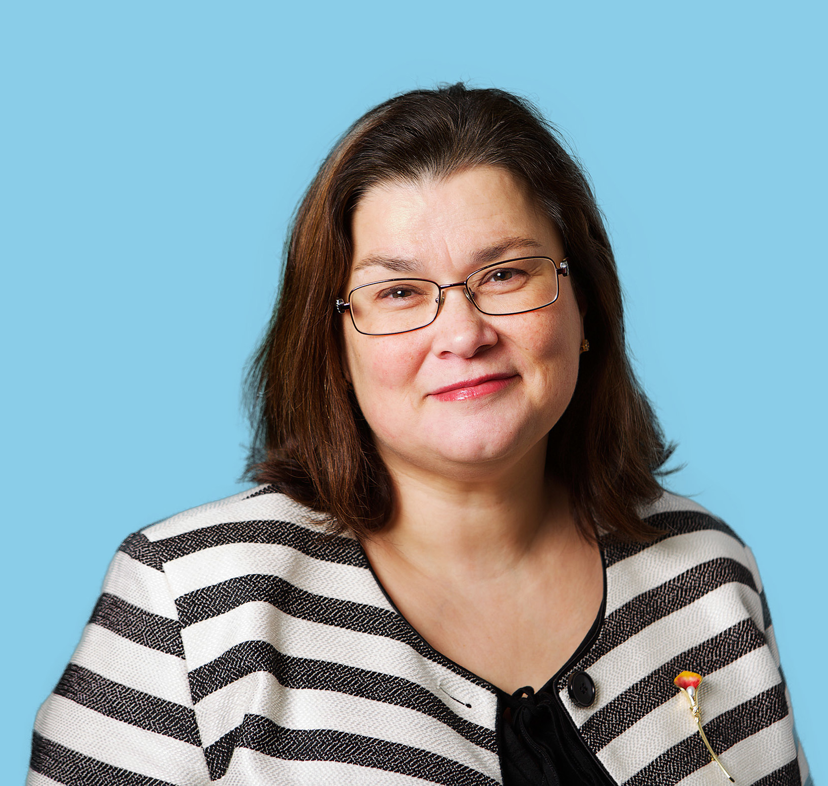 Kandidaat-Kamerlid. Foto: Lex Draijer.